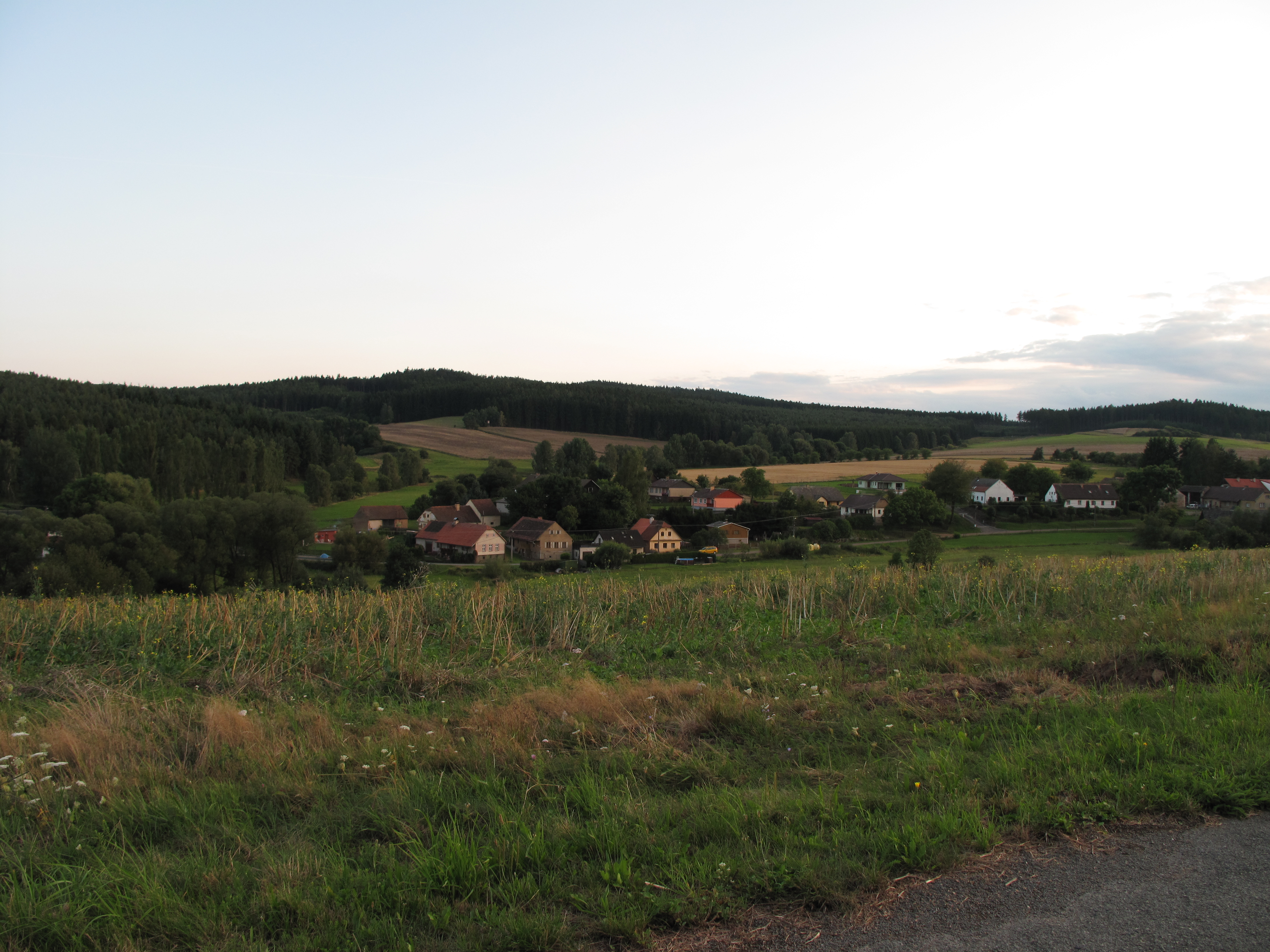 Pohled na Sebečice od severovýchodu. Okres Rokycany, Česká republika.